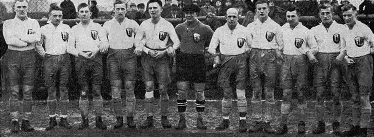 Fußballmannschaft des Beuthener SuSV 09, die im Jahr 1930 südostdeutscher Meister wurde.von links nach rechts: Palluschinski, Franielczyk, Malik I, Bittner, Strewitzek, Kurpanek I, Urbainski, Pryssok, Nowak, Kurpanek II, MalikII